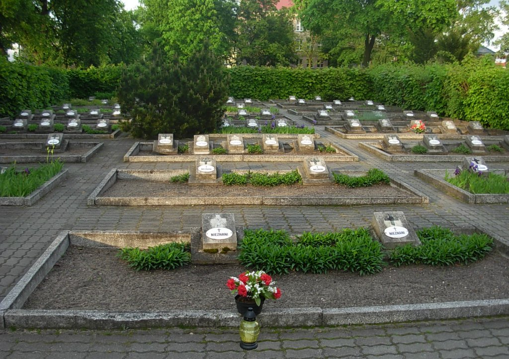 Cmentarz komunalny, Bydgoszcz ul Kcyńska. Kwatera wojenna